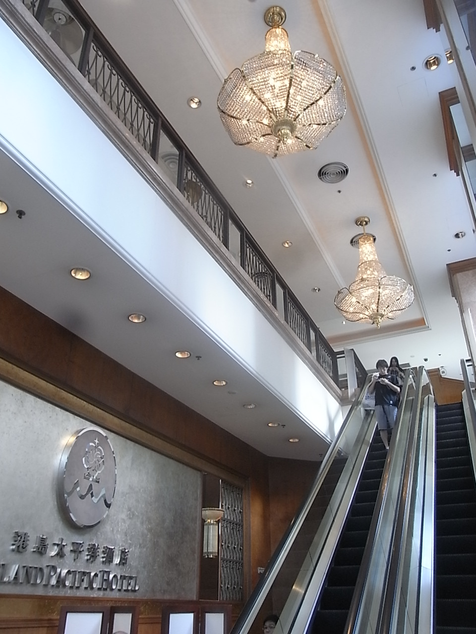 中文（香港）: 香港zh:港島太平洋酒店 天花板 吊燈